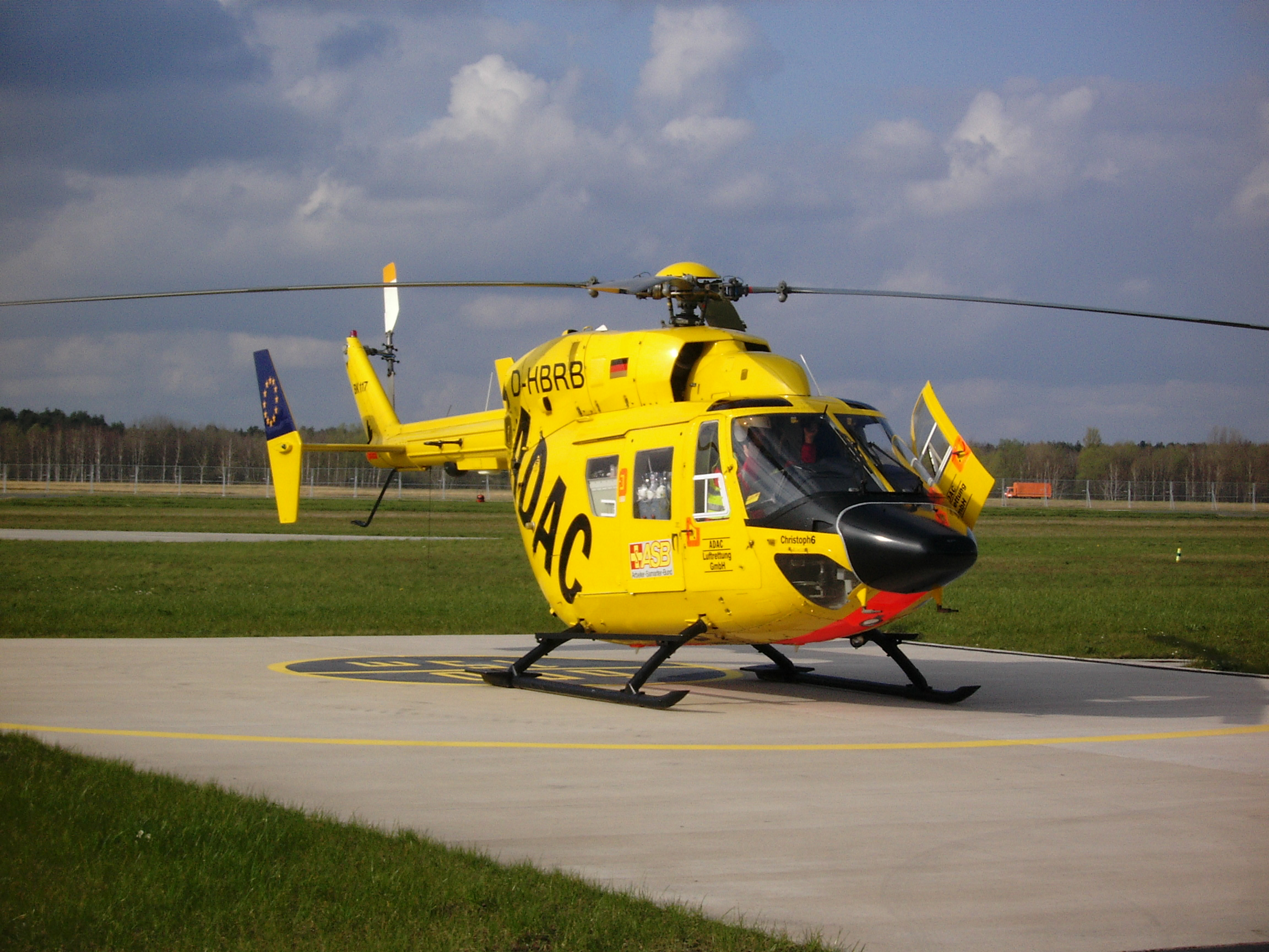 Christoph 6 Bremen